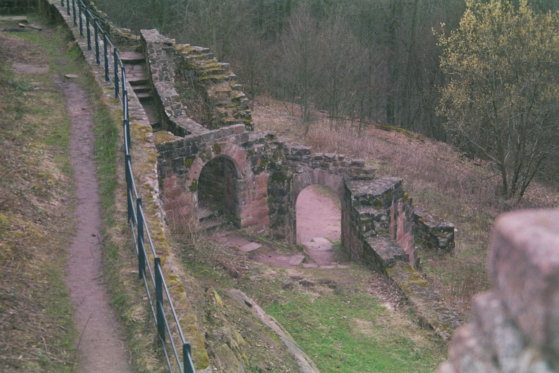 Eingang der Ruine Wegelnburg. 1. Tor rechts, 2. Tor links, dahinter ein kleiner Graben.